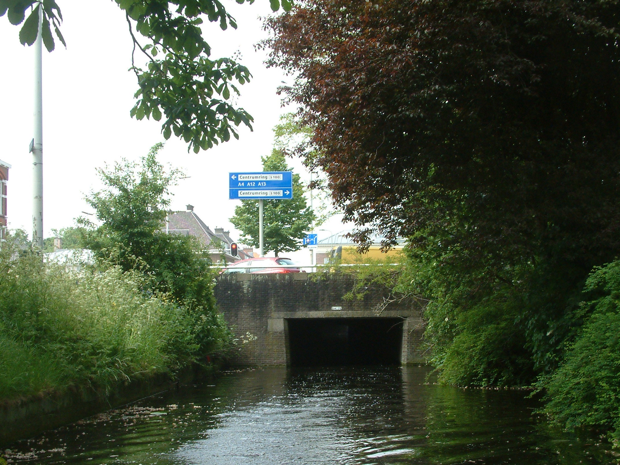 Bridges in The Hague as mentioned in the filename.